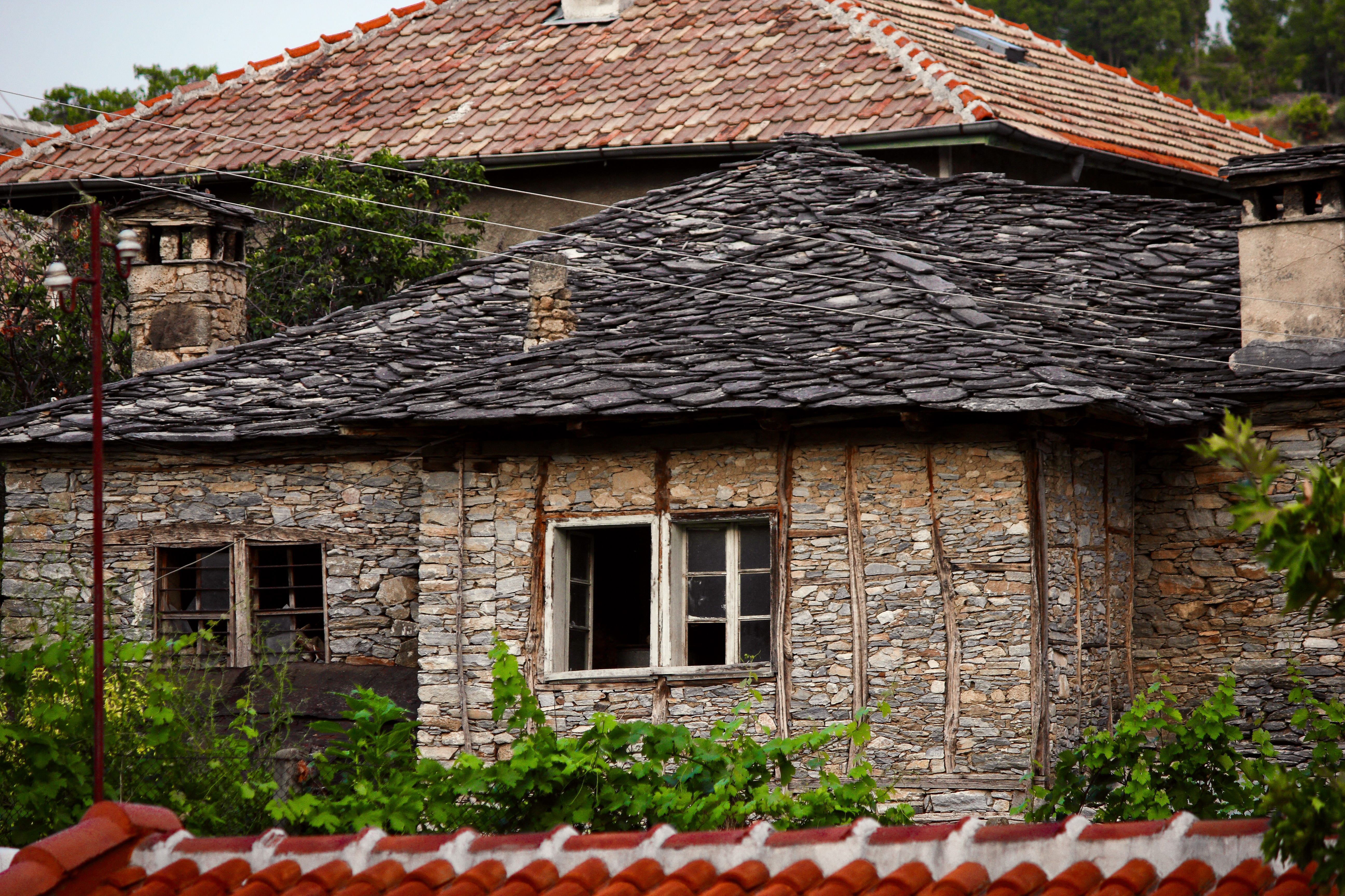 Възрожденска къща в село Туховища.